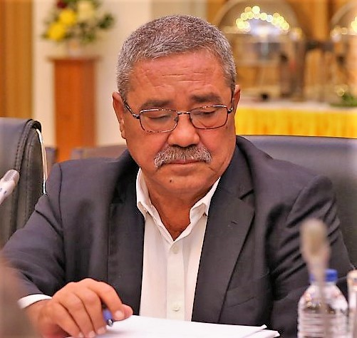 Faustino Godinho Gonçalves bei der Sitzung des Staatsrats